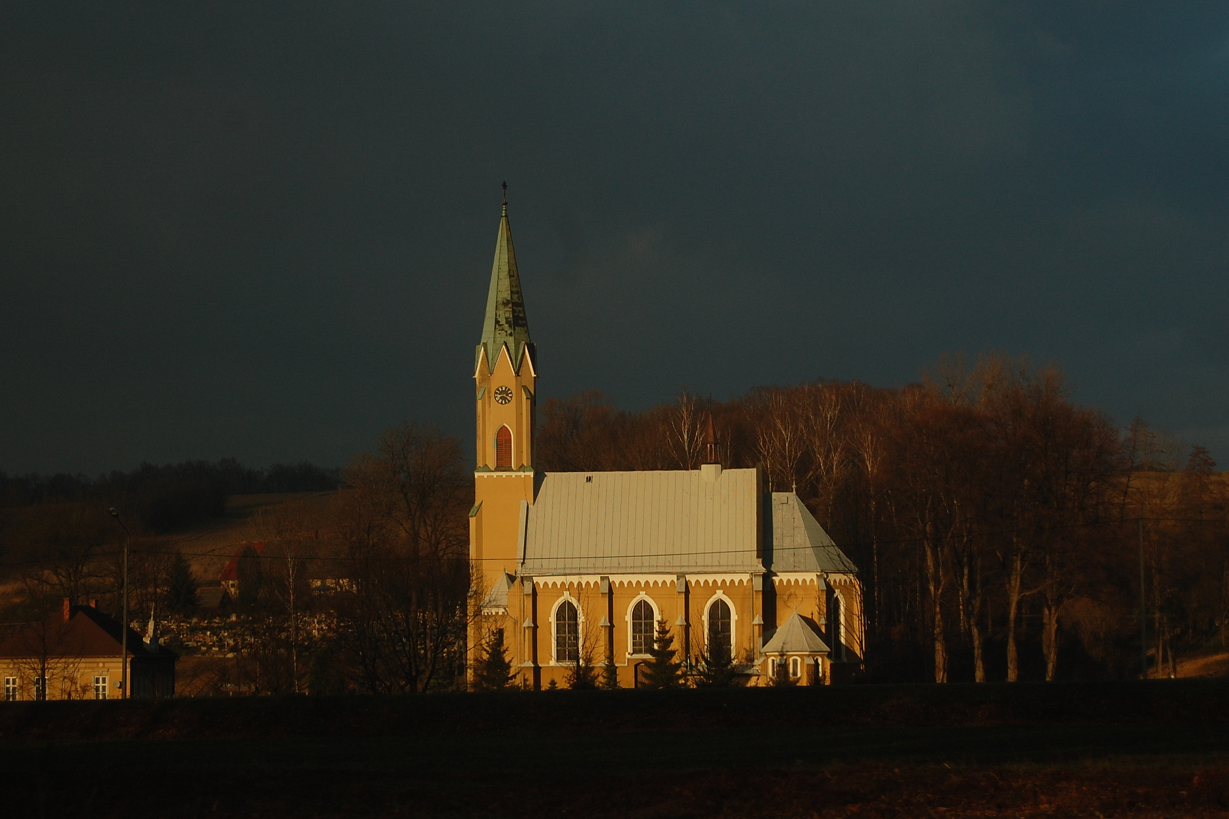 Kostel svaté Máří Magdaleny v Mazańcovicích (Polsko)